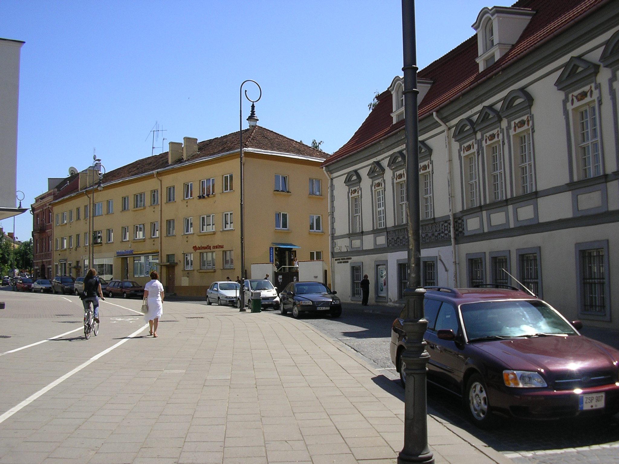 architecture, Vilnius Lithuania